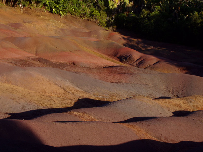 Terres des Couleurs im Südwesten von Mauritius